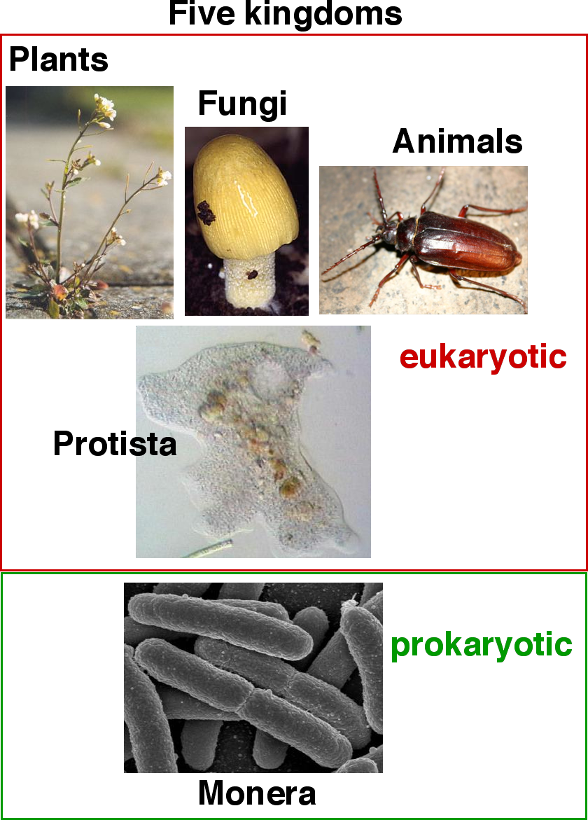 5 Kingdoms System